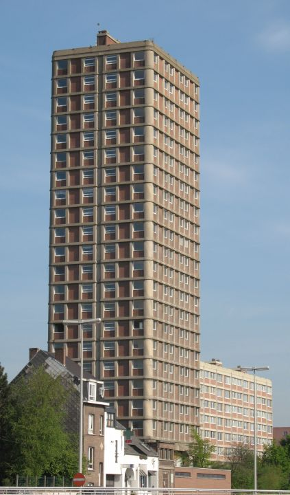 Woontoren A12 van Renaat Braem (1972)